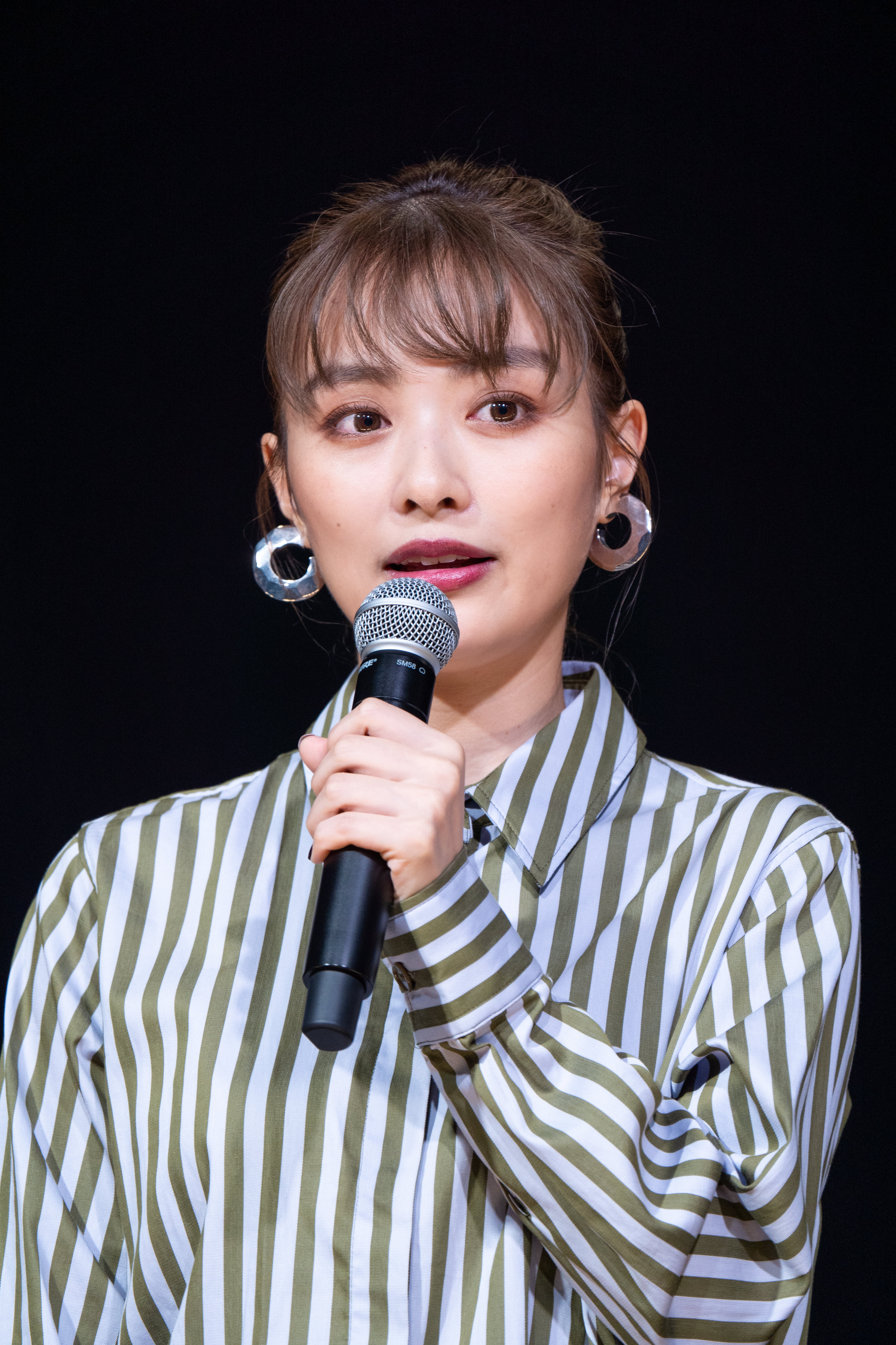 Super! C CHANNEL 2019 内田理央